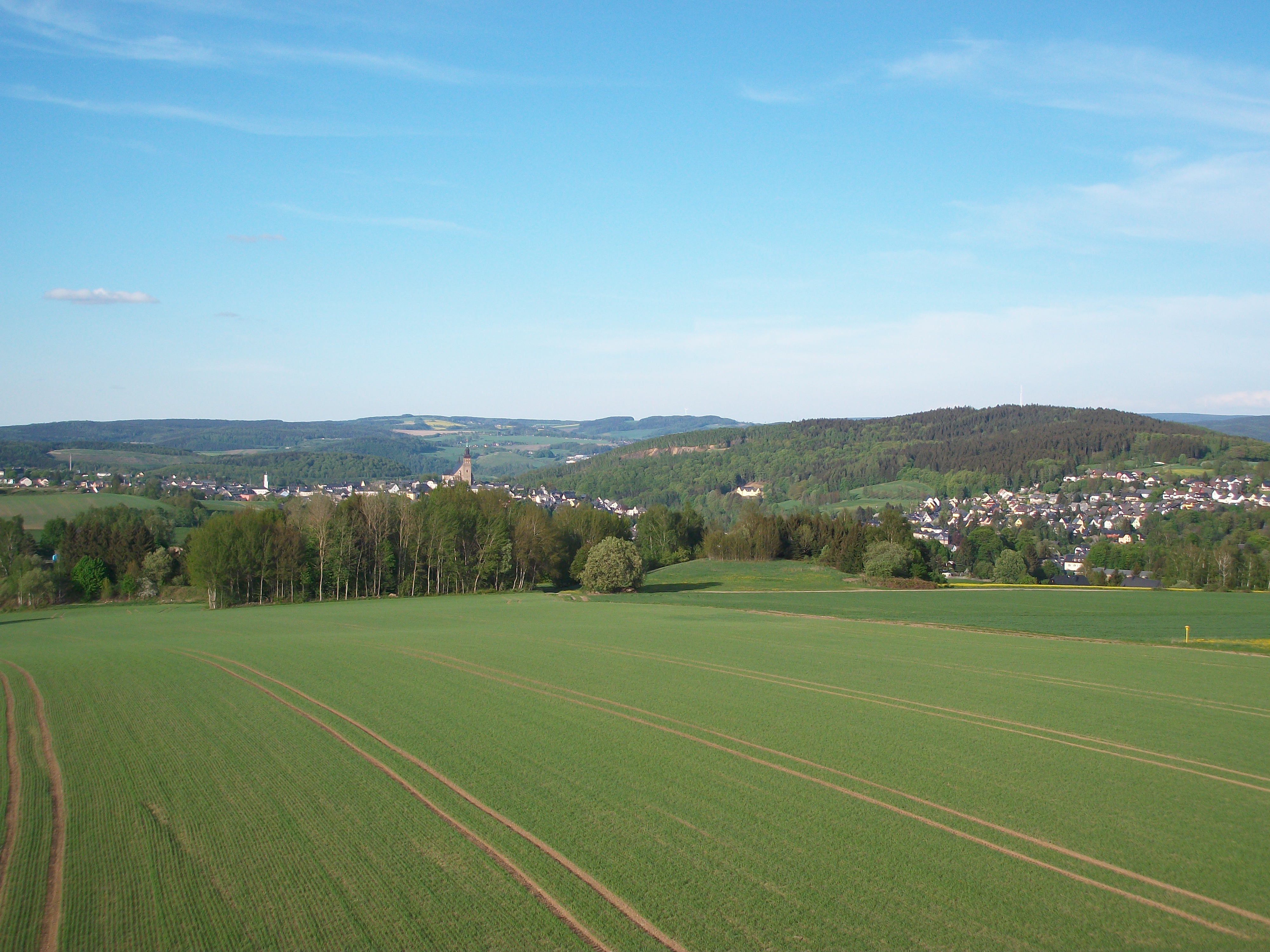 Fundgrube Daniel, Blick auf Schneeberg mit dem Gleesberg